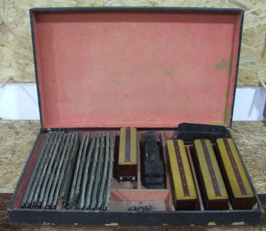 Caja de madera del tren Elektro del modelo 3-P